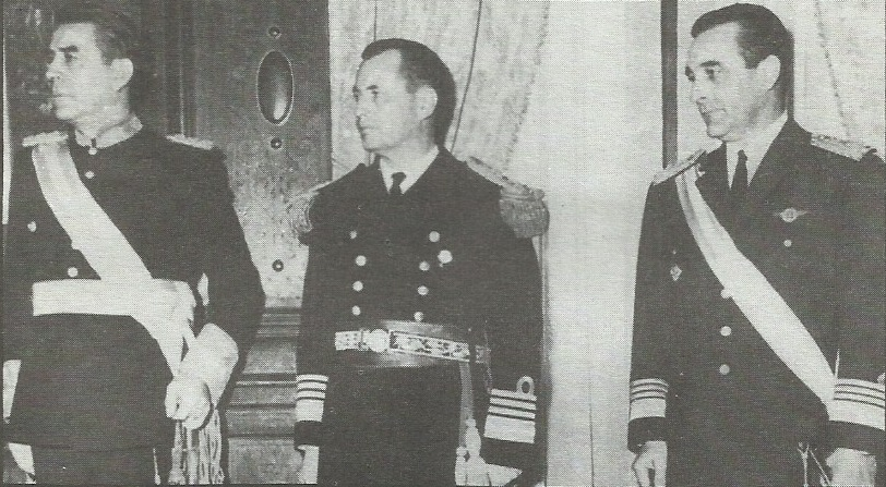 La Junta de Comandantes en Jefe: Teniente General Pascual Ángel Pistarini, Almirante Benigno Ignacio Marcelino Varela y el Brigadier General Adolfo Teodoro Álvarez tras deponer a Arturo Umberto Illia.